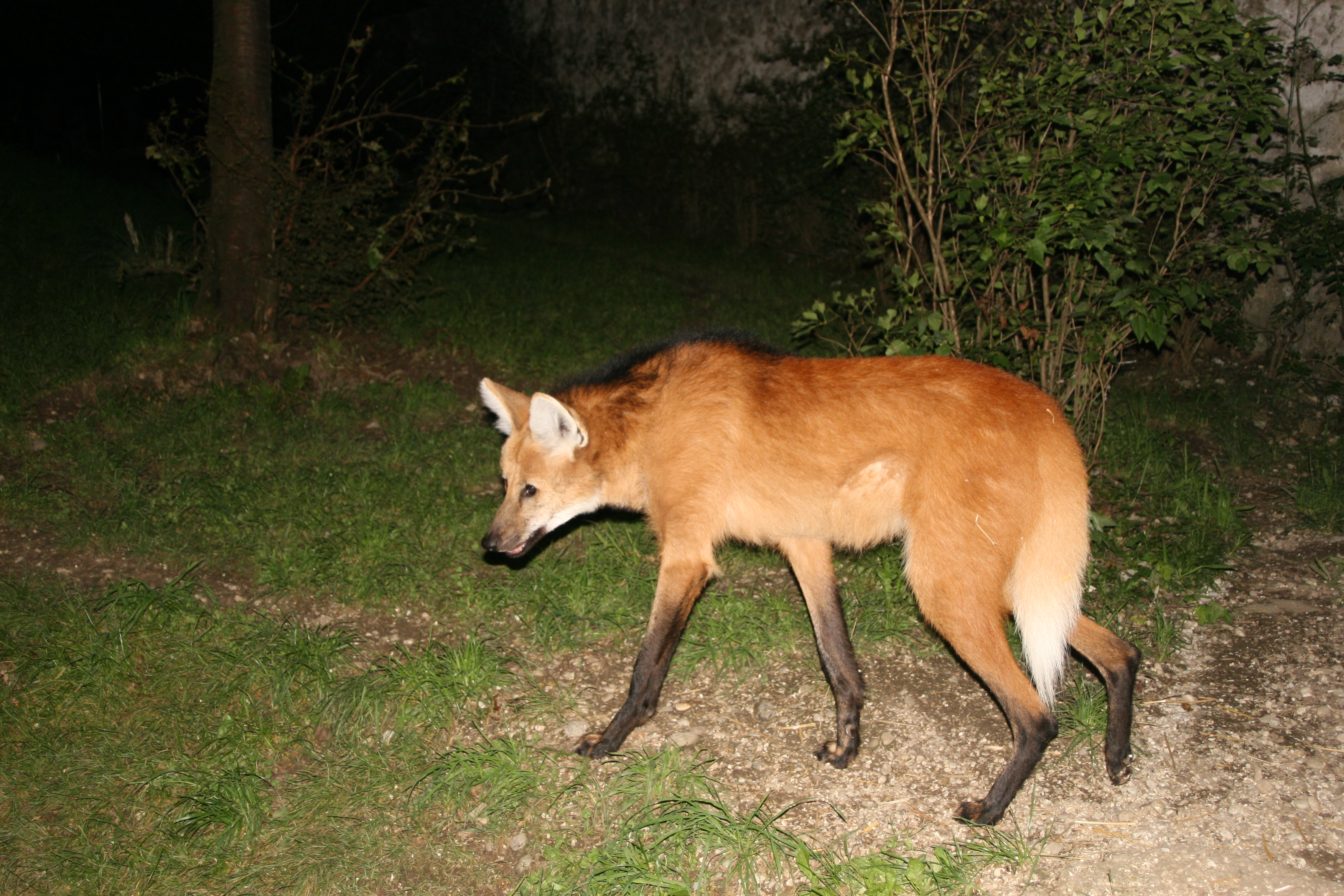 Mähnenwolf im Zoo Salzburg